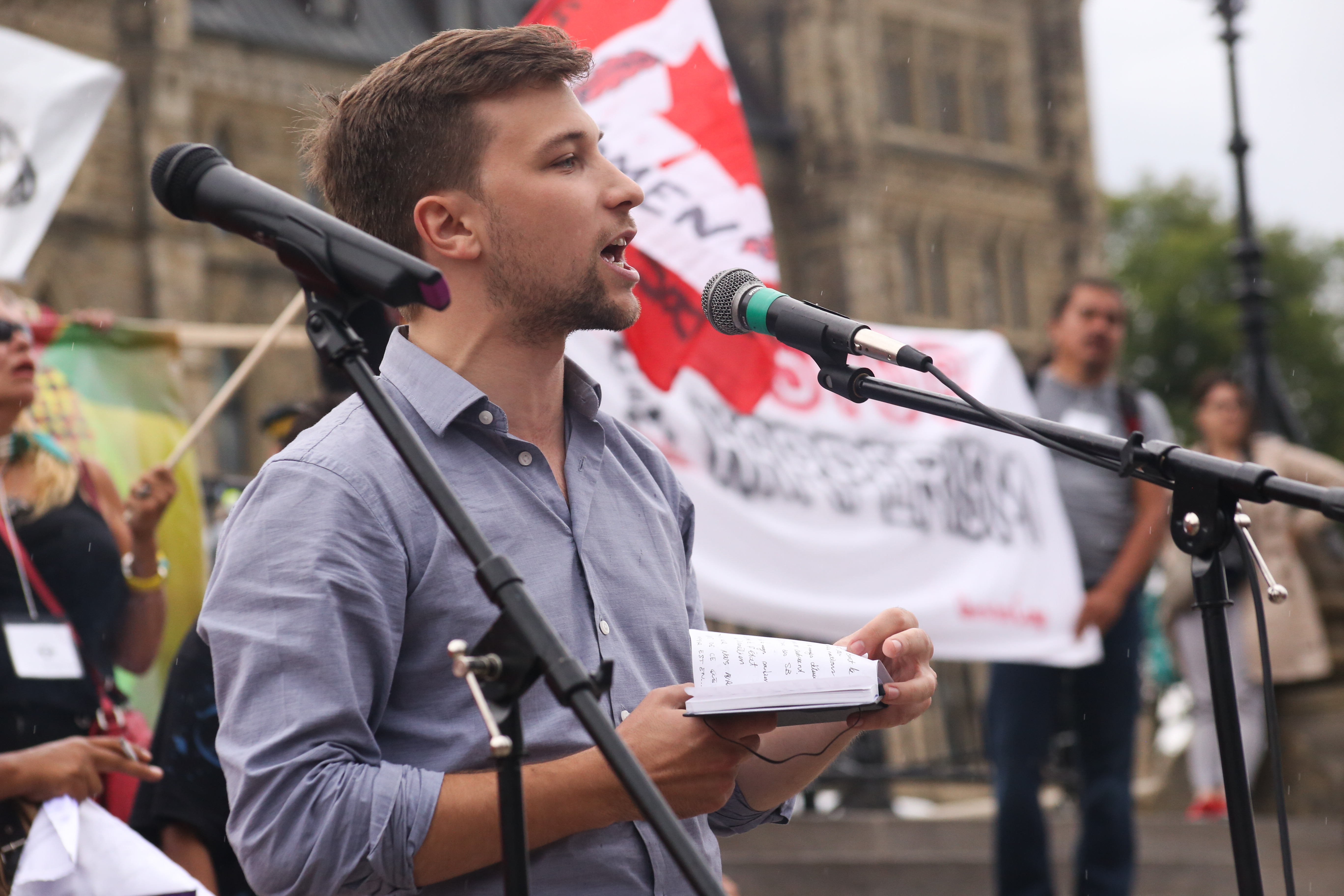 Gabriel Nadeau-Dubois devant l'édifice du Parlement du Canada